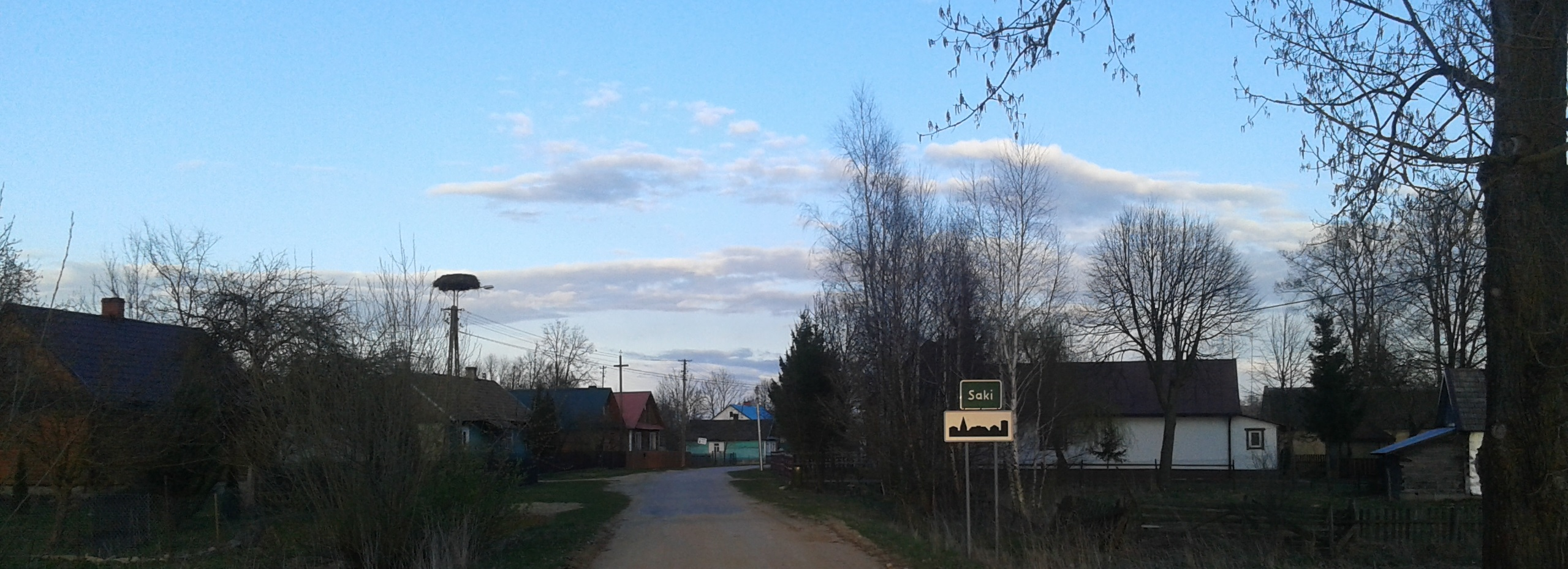 Saki - wjazd od strony SobótkiБеларуская (тарашкевіца): Сакі - уезд з боку Суботкі